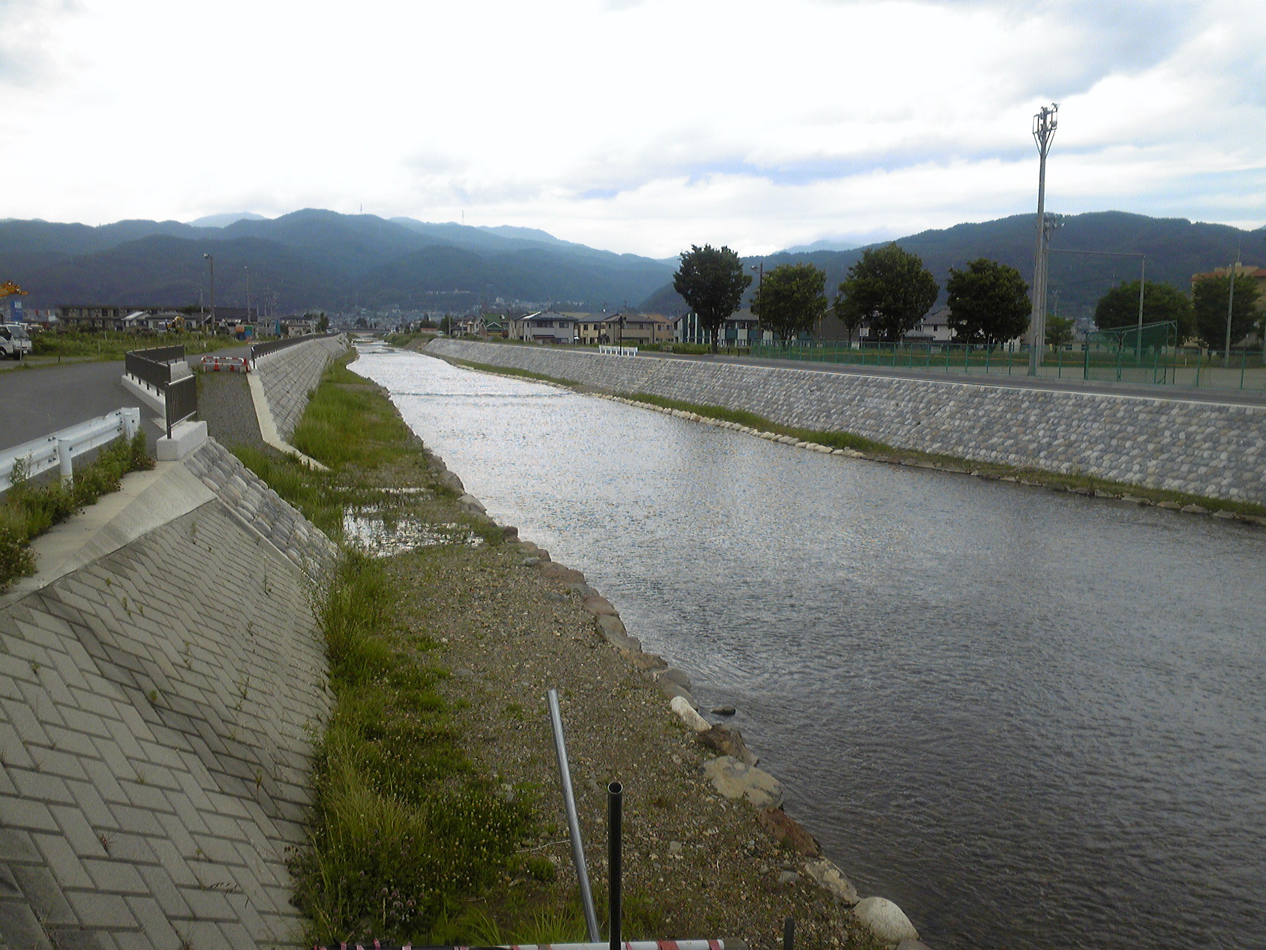 砥川。長野県諏訪郡下諏訪町西赤砂、砥川橋（とがわばし）より上流方向。